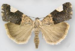 Acontia areloides female